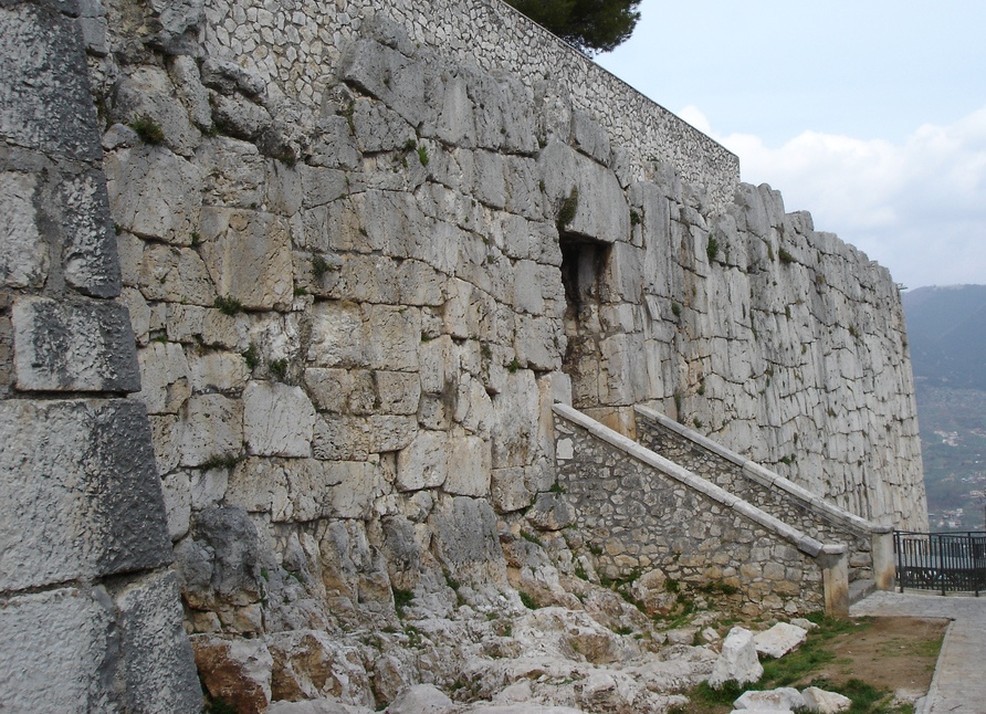 Questa foto è stata scattata da me. Ne autorizzo il libero uso su Wikipedia